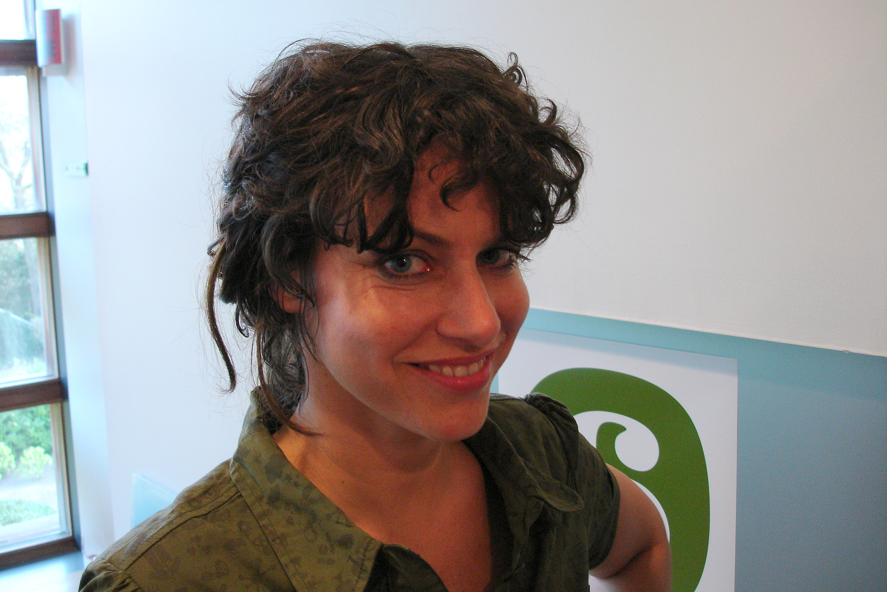 Ellen ten Damme, Nederlands zangeres